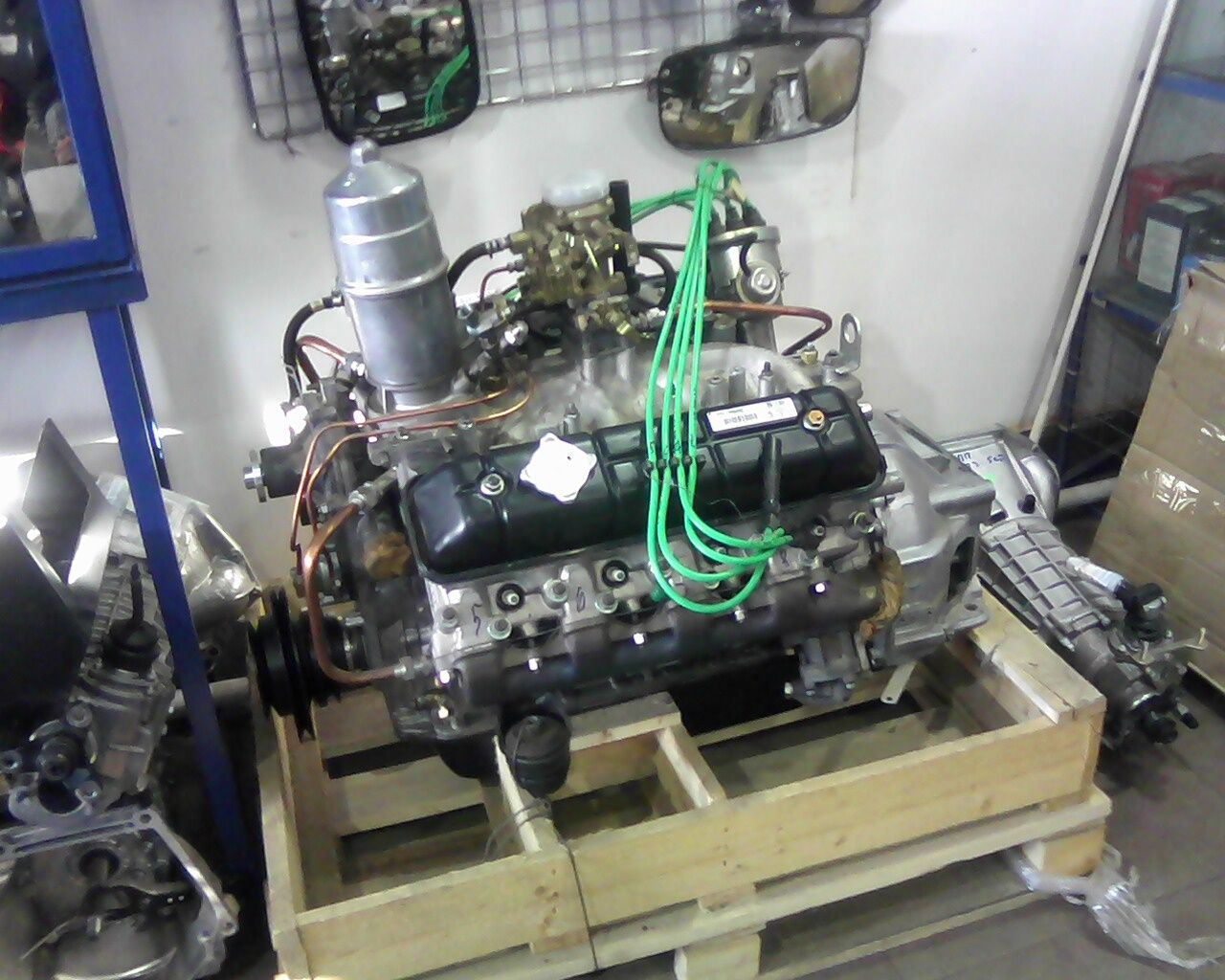 Двигатель ГАЗ-53